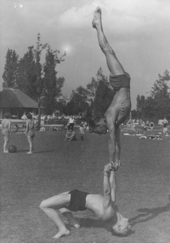 Berlin, Gymnastik ADN-ZB-Archiv Berlin 1948; Gymnastik [am Strand] Aufnahme: Gerhard Schmidt, Berlin-Treptow 2129-48